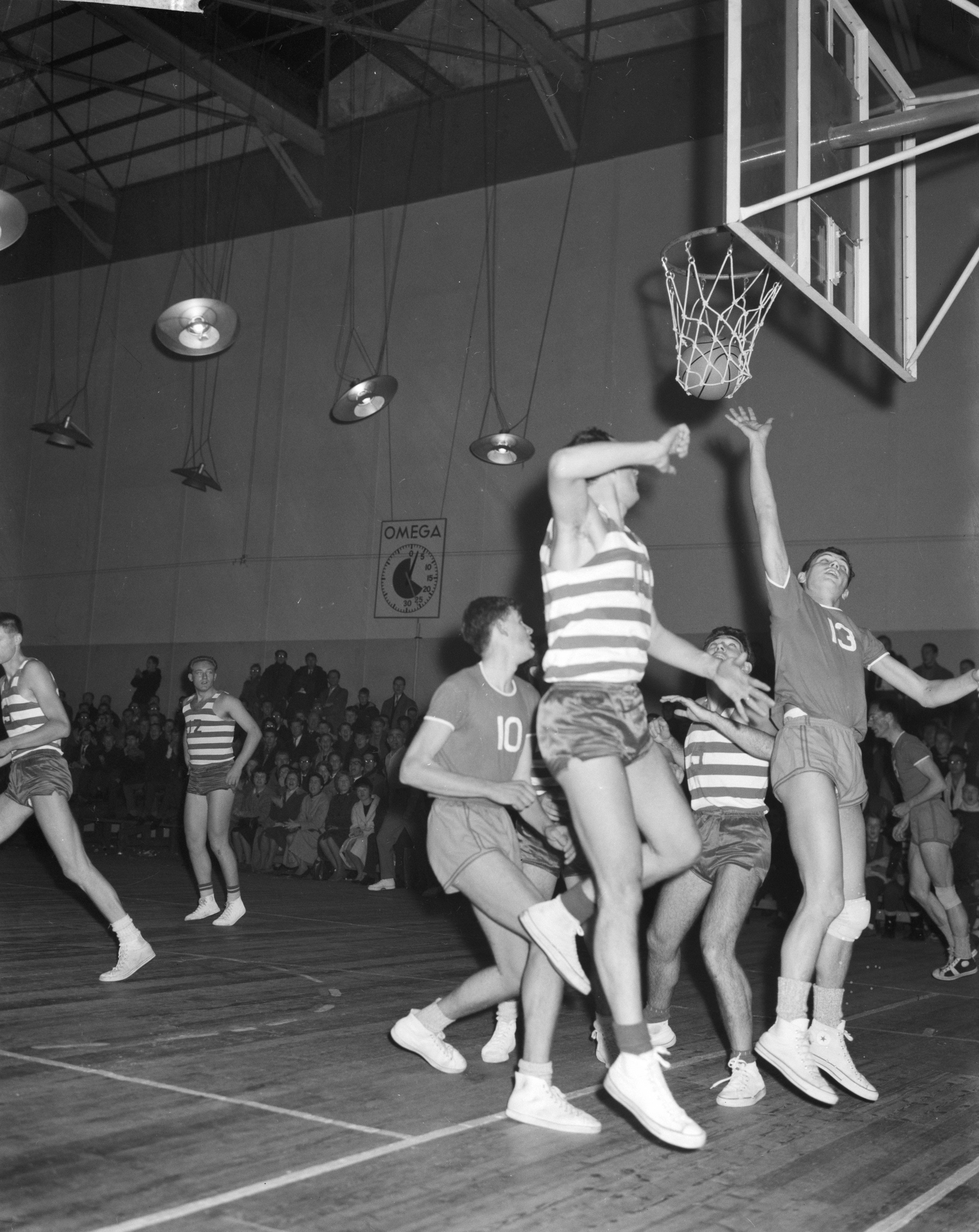 Collectie / Archief : Fotocollectie Anefo Reportage / Serie : [ onbekend ] Beschrijving : Basketbalwedstrijd The Wolves tegen Bagnolet in de Apollohal. Aanval van The Wolves Datum : 1 december 1961 Trefwoorden : Basketbal, aanvallen Instellingsnaam : Apollohal, Wolves, The Fotograaf : Rossem, Wim van / Anefo Auteursrechthebbende : Nationaal Archief Materiaalsoort : Negatief (zwart/wit) Nummer archiefinventaris : bekijk toegang 2.24.01.04 Bestanddeelnummer : 913-2467